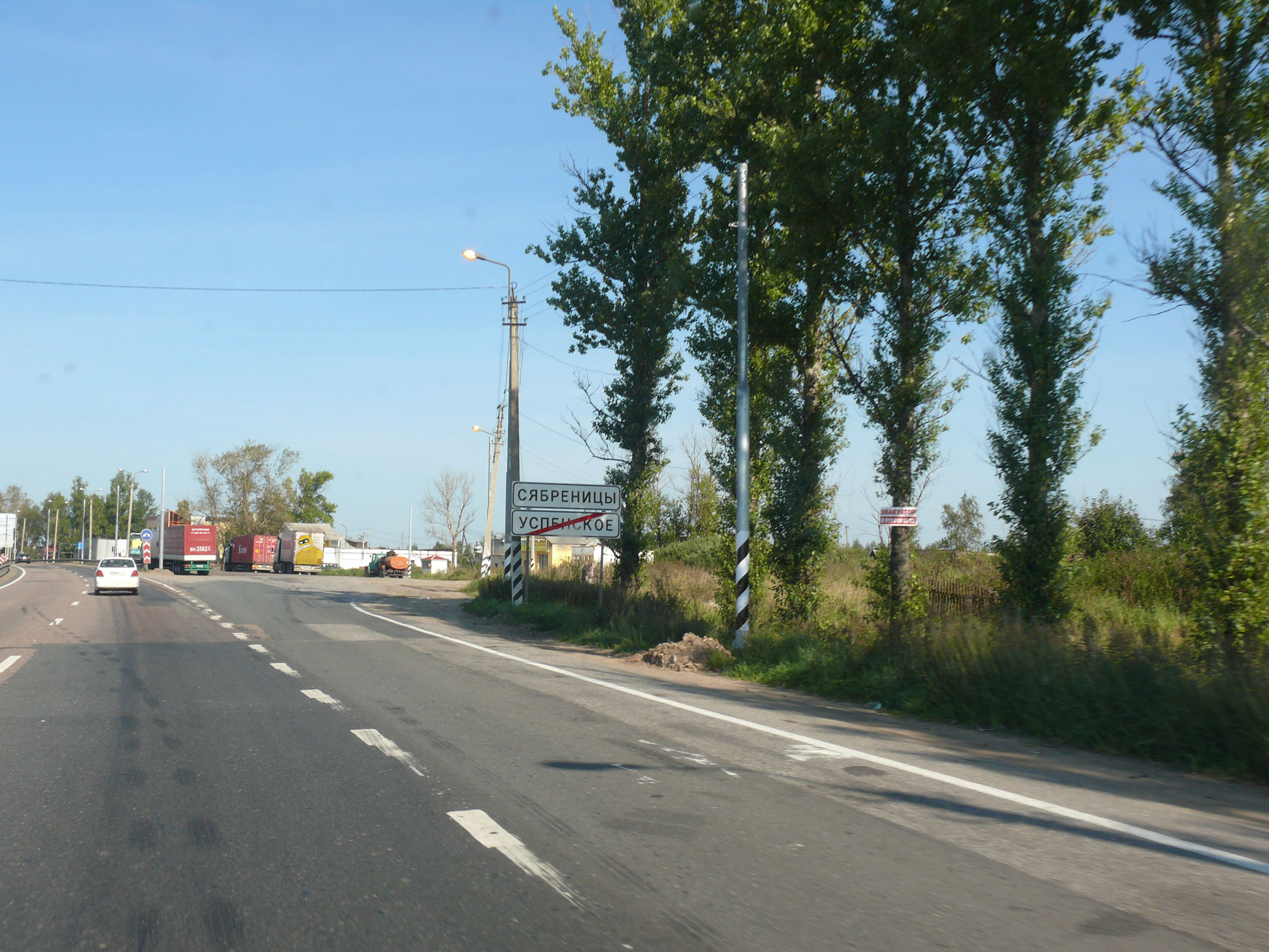 Въезд в деревню Сябреницы Чудовского района Новгородской области